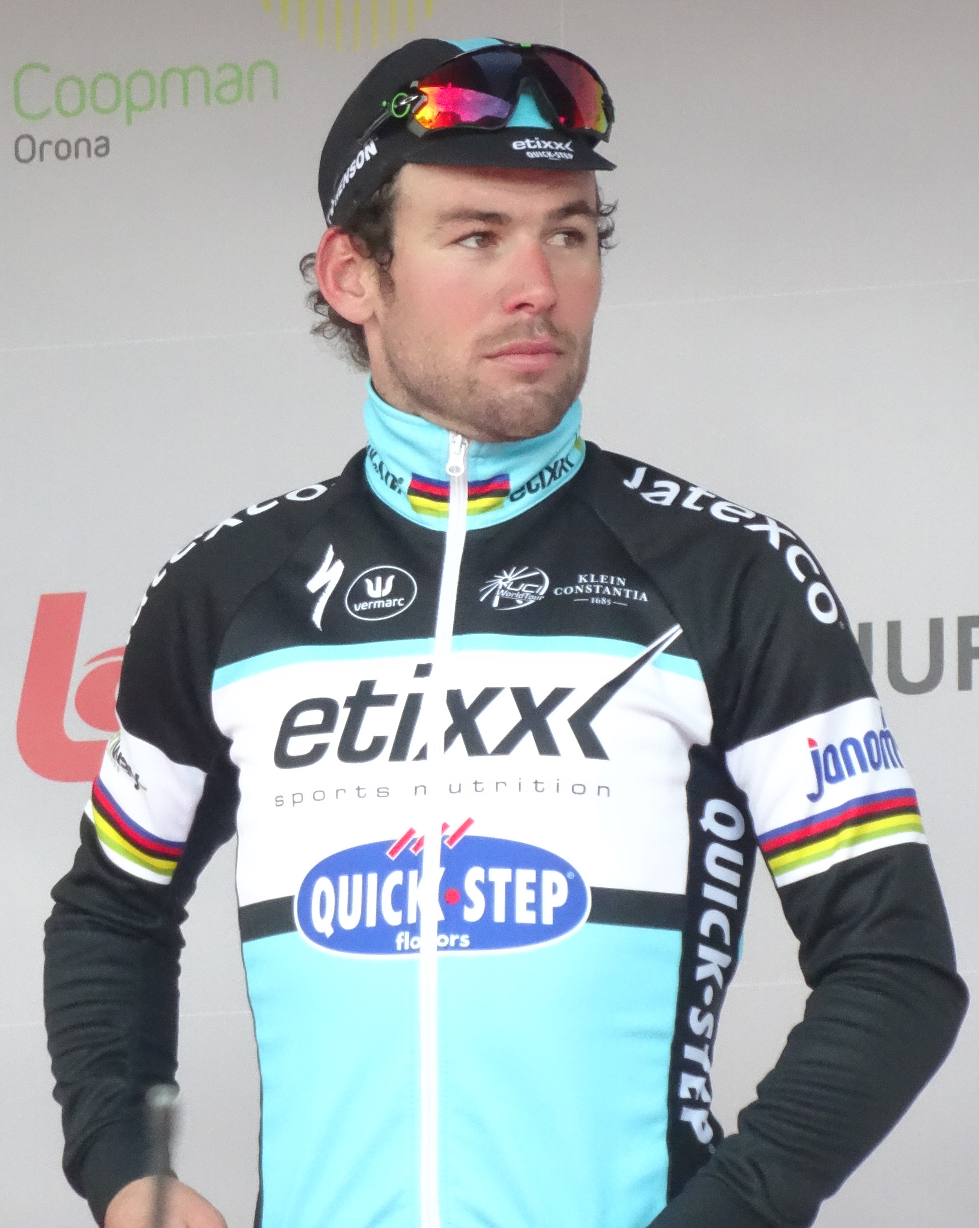 Reportage réalisé le dimanche 1er mars à l'occasion du départ et de l'arrivée de Kuurne-Bruxelles-Kuurne 2015 à Kuurne, Belgique.